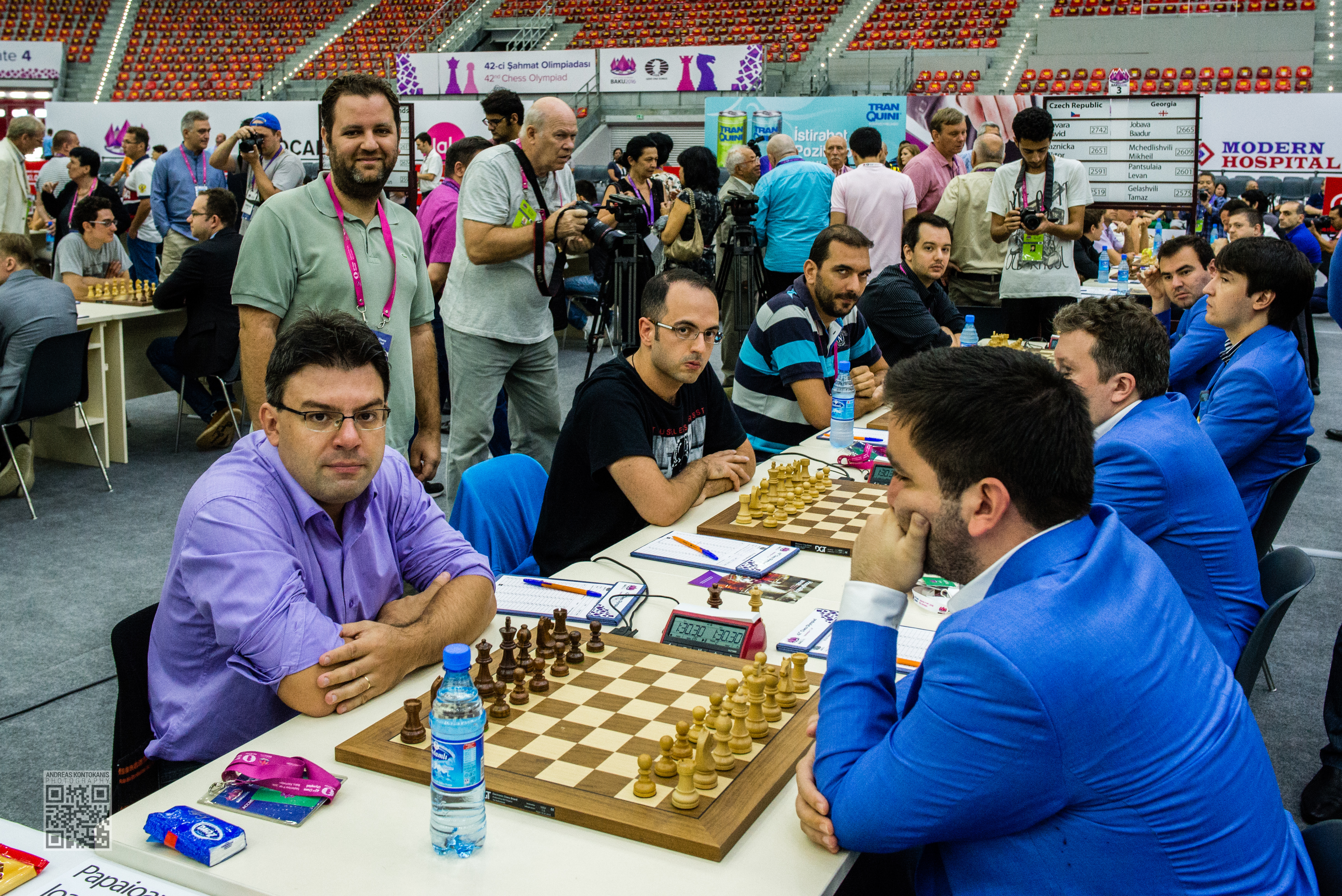 Greek Men's team